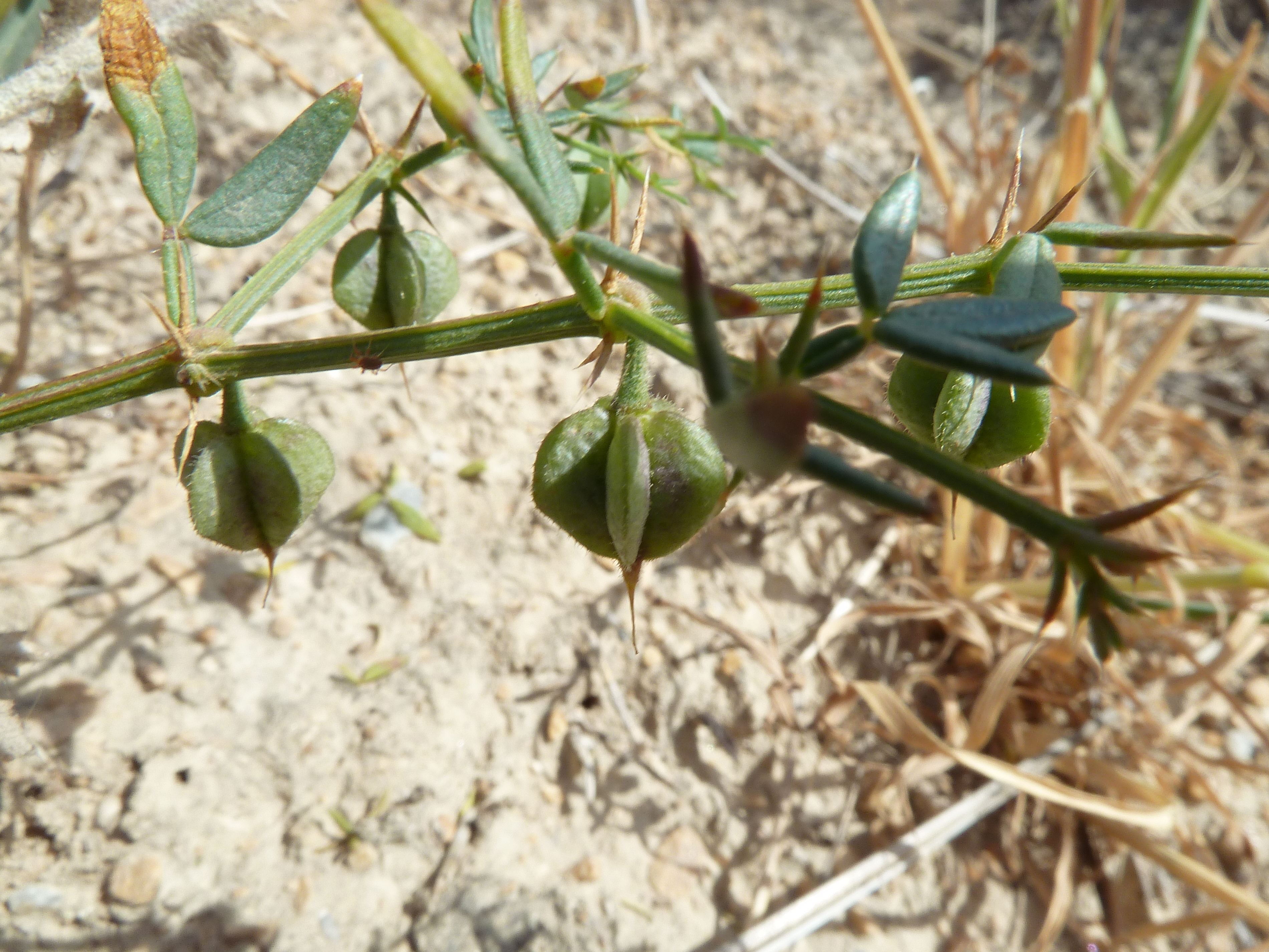 Fagonia cretica : Fructificación inmadura - Cabezo de Pallarés, Albatera (Provincia de Alicante, España)